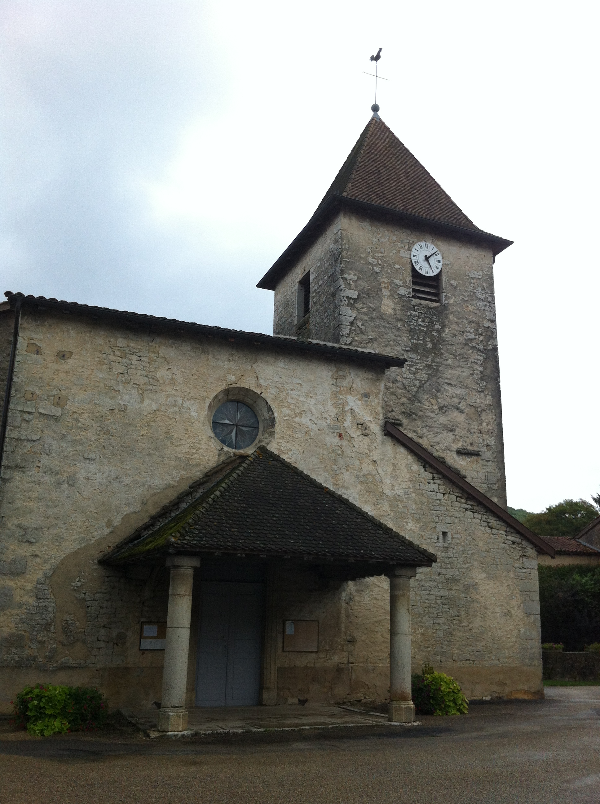 Vue de l'Église Saint-Pierre de Chavannes-sur-Suran (01250)